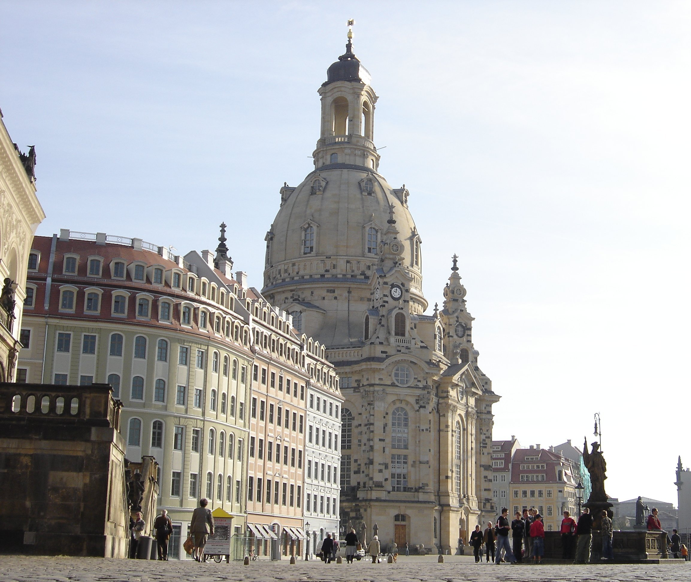 Jüdenhof and Neumarkt in Dresden